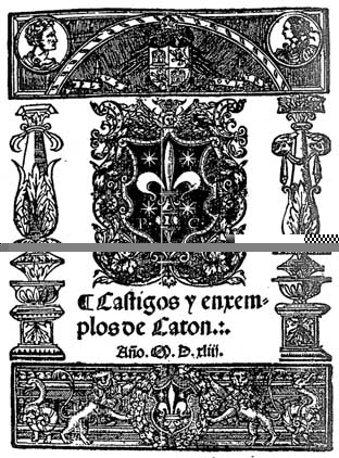 Edición de Catón castellano, editada en Medina del Campo en 1543.